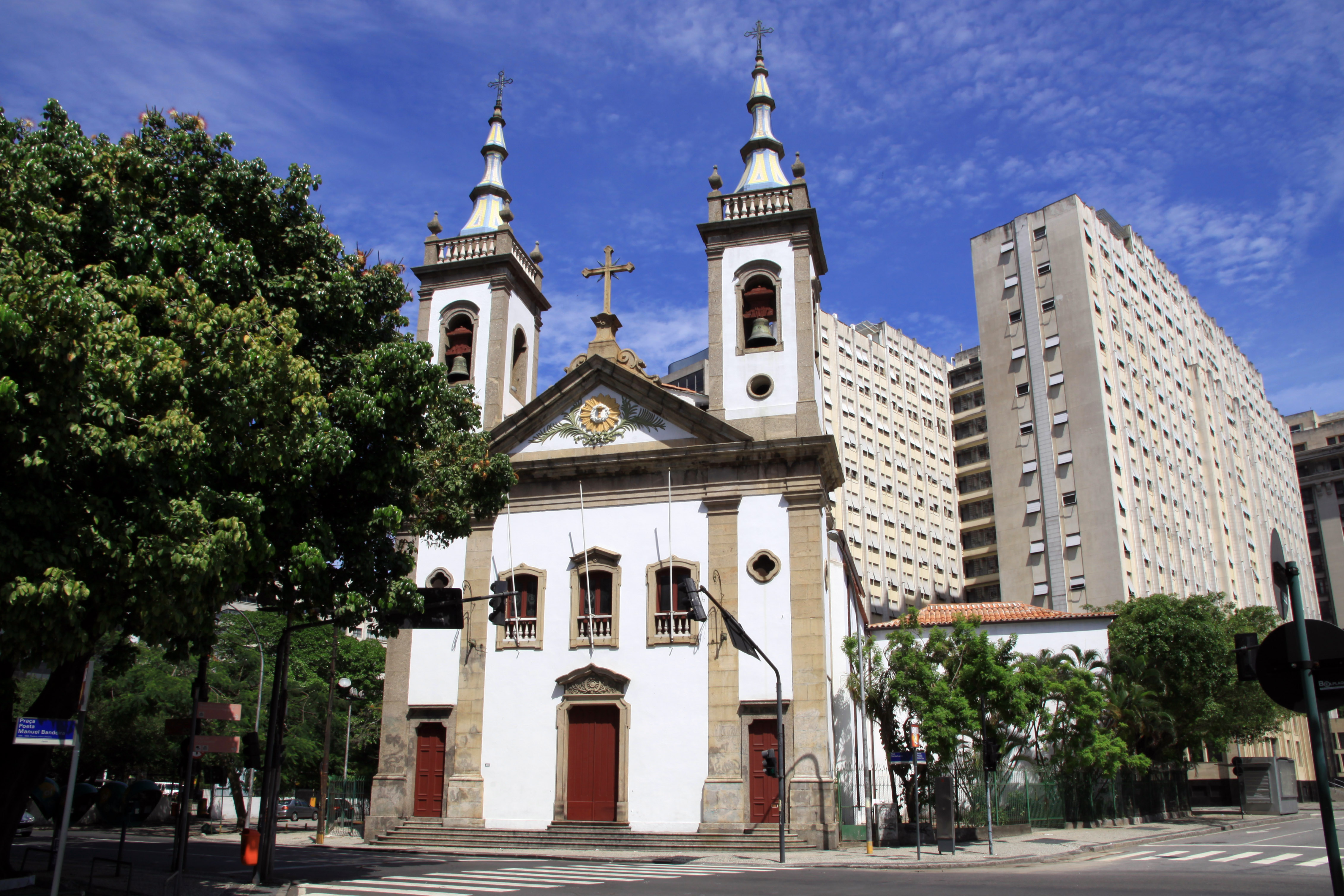 Igreja de Santa Luzia na Rua de Santa Luzia, Rio de Janeiro.